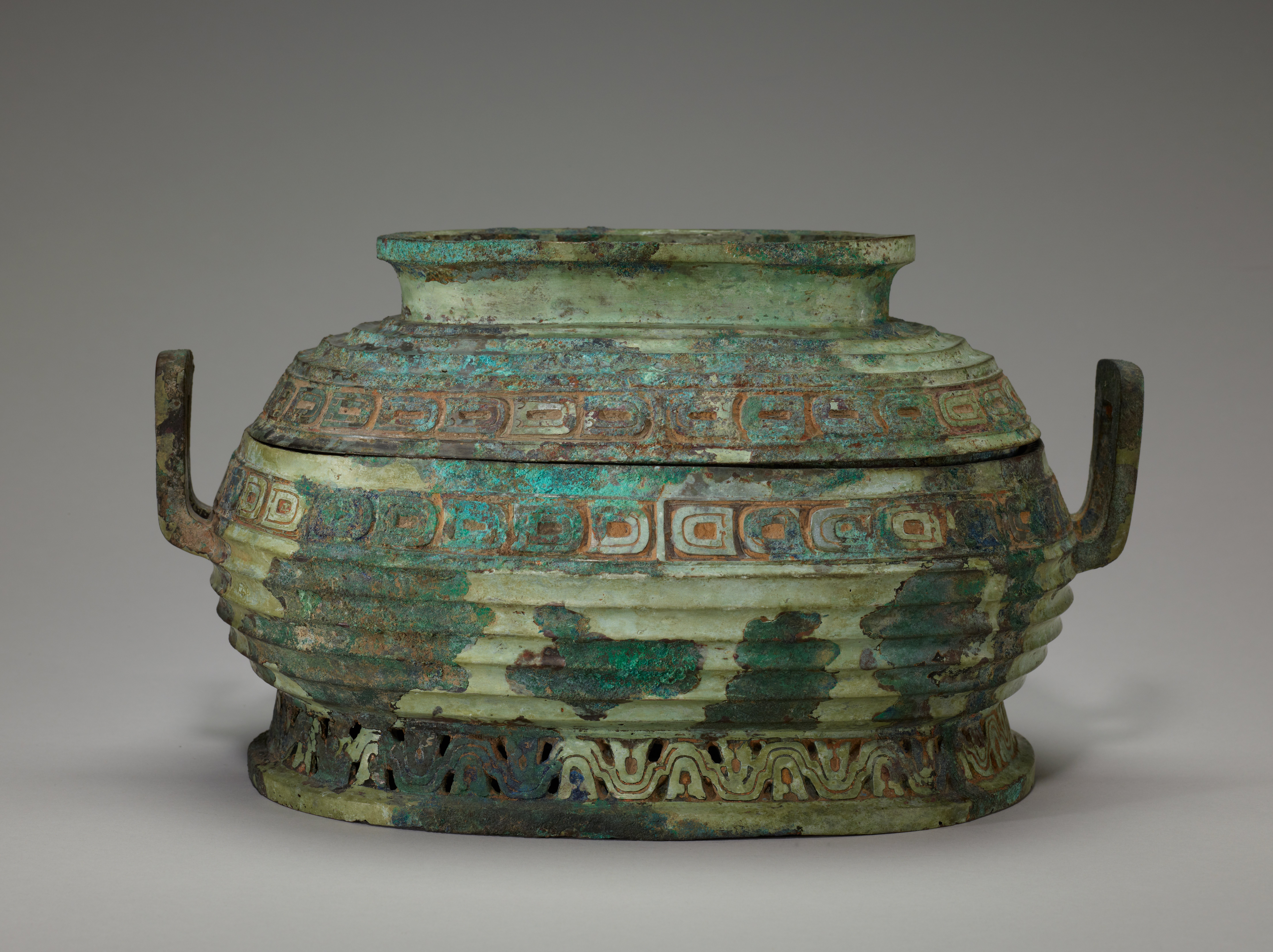 西周青铜盨，明尼阿波利斯艺术研究所（MIA）藏。